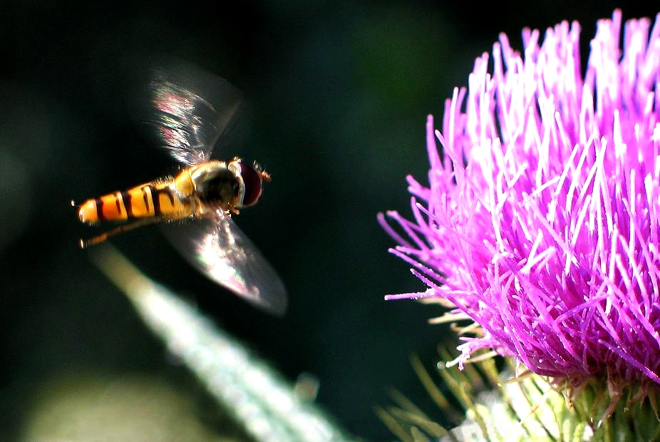 Schwebfliege an Diestelblüte, fotografiert im August 2004 von soebe Titel: Schwebfliege an Diestelblüte Foto: soebe (Sönke Behrends, 04.08.2004) (Original text: Eine Schwebfliege im Anflug auf eine Diestelblüte. Das Motiv habe ich sehr häufig fotografiert, bis diese einigermassen scharfe Aufnahme dabei herausgekommen ist. Optimal ist die Aufnahme zwar immer noch nicht. Aber viel besser bekomme ich die wohl mit meiner Ausrüstung nicht hin.)